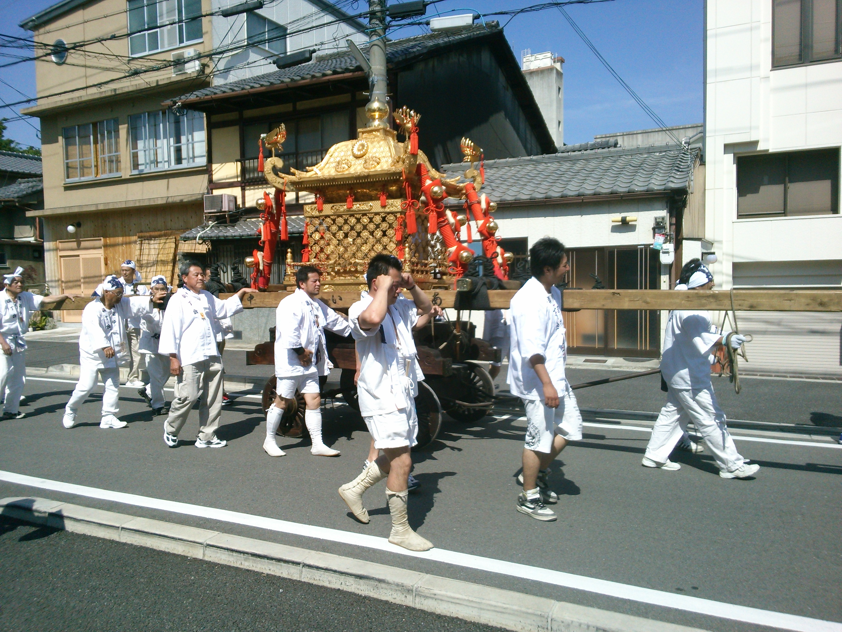 2013年の今宮神社還幸祭 小川通りを進む神輿